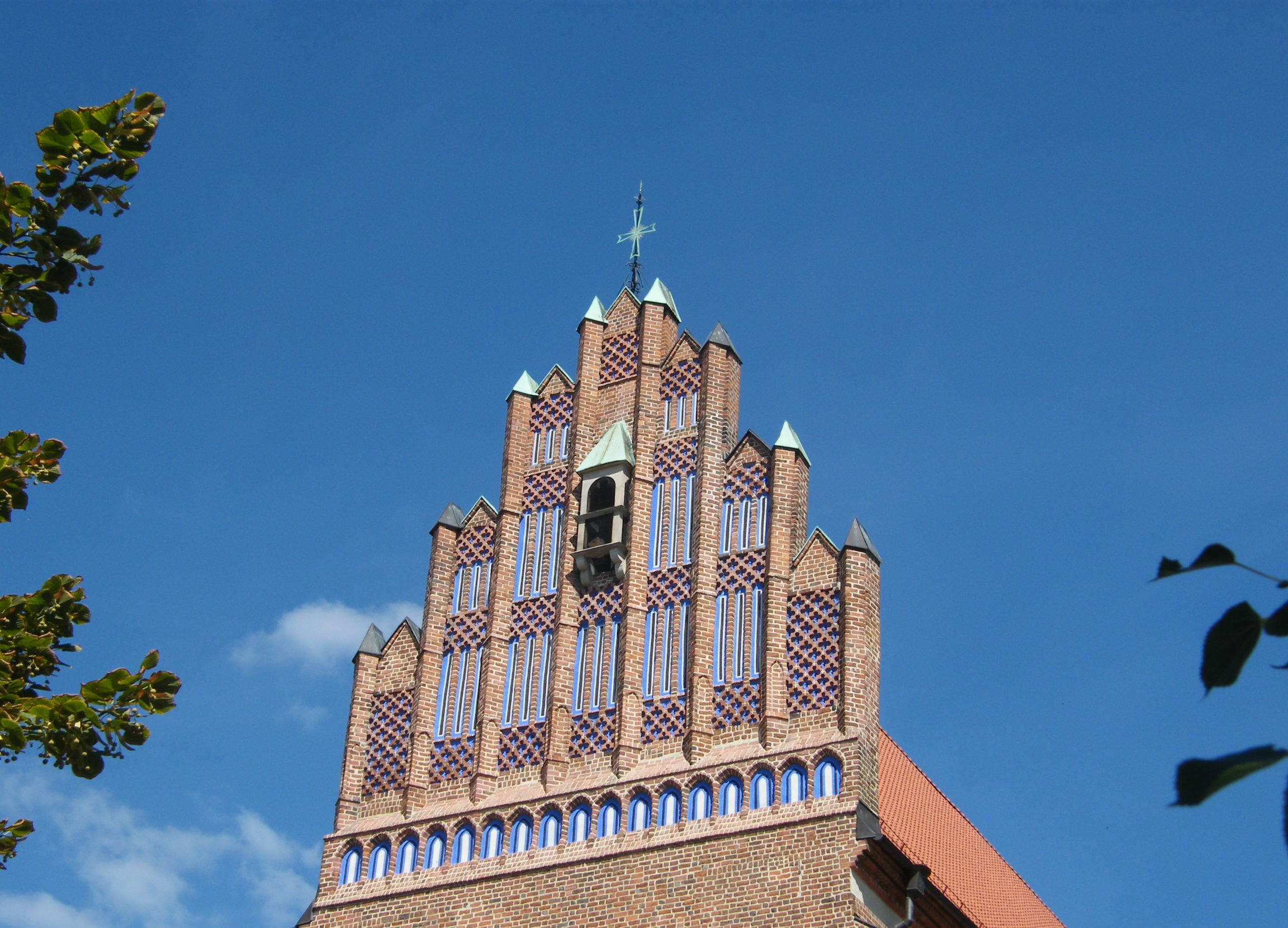 Wrocław, kościół p.w. Bożego Ciała, 2 ćw. XV